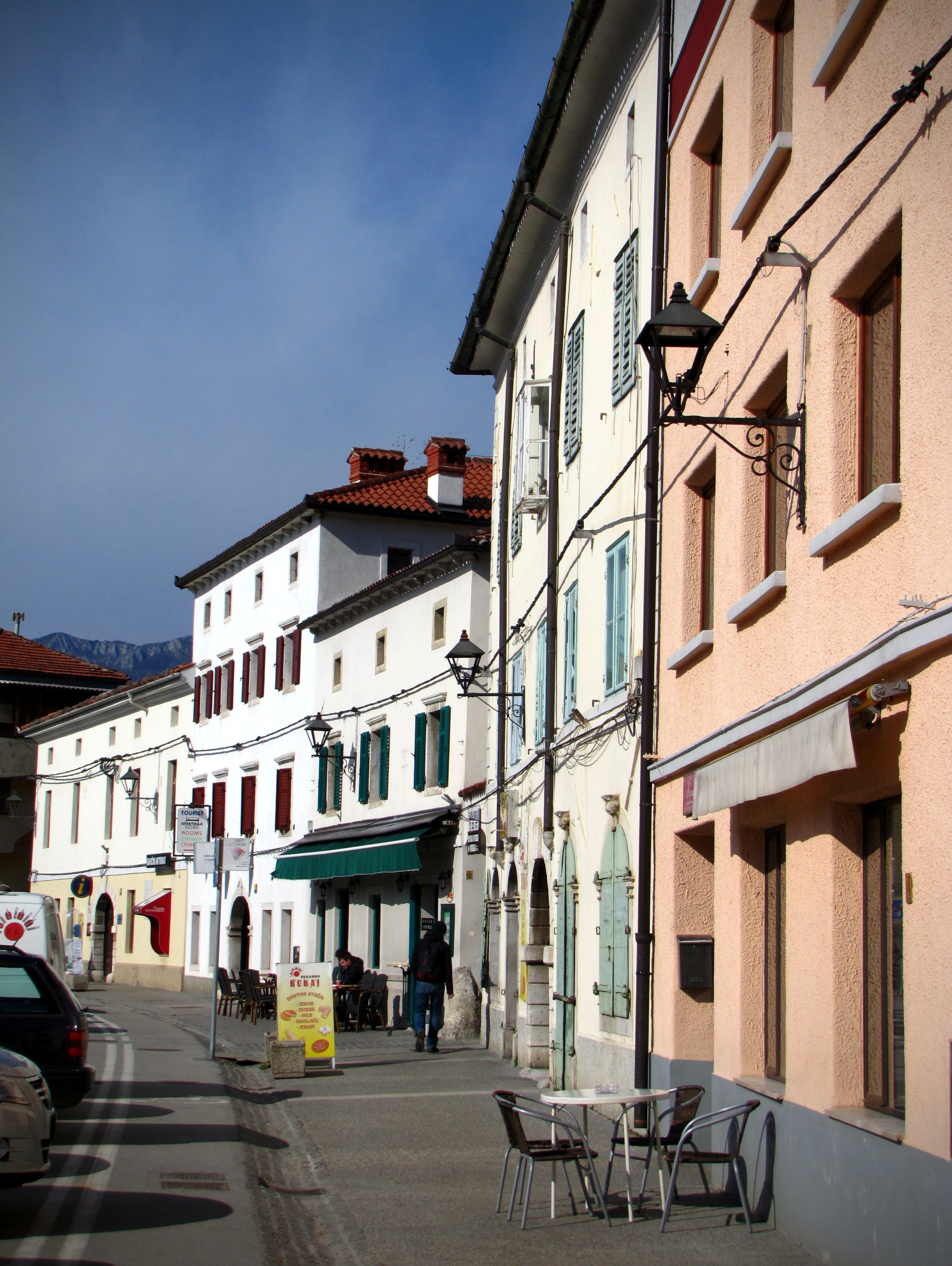 Lipica Open